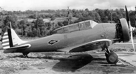 Boeing P-29